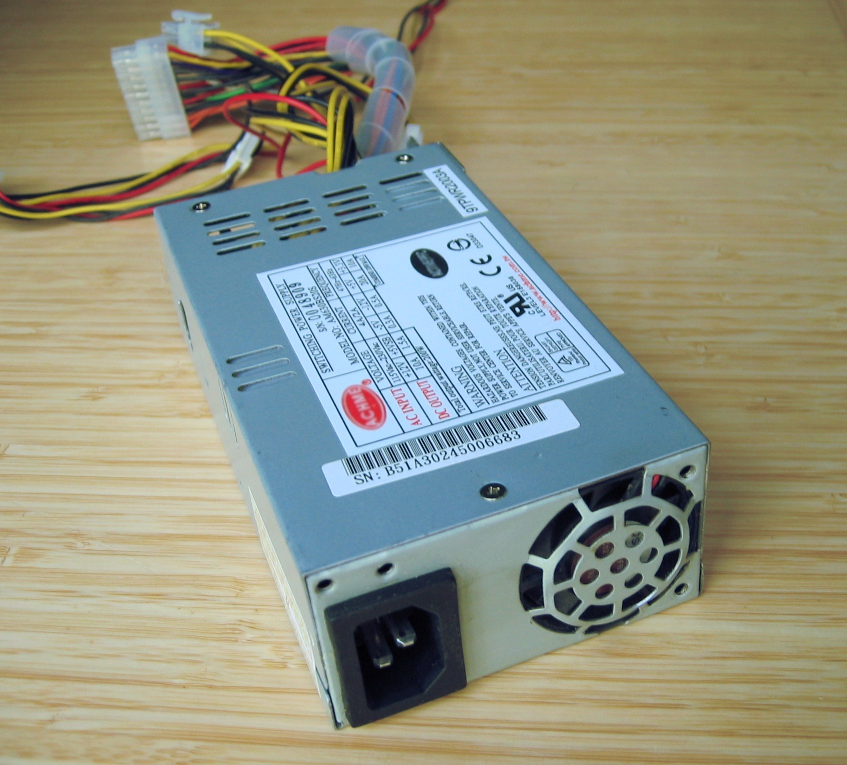 PC-Netzteil mit 40mm Lüfter 1HE